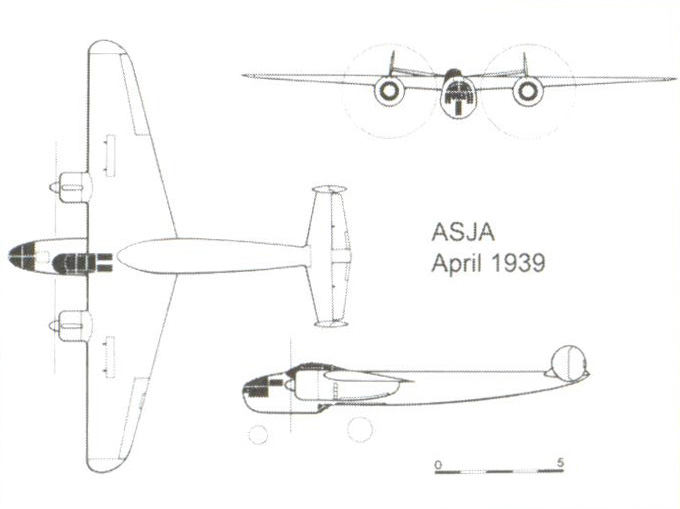 ASJAs L 11 med flygvapnets test beteckning P8A.